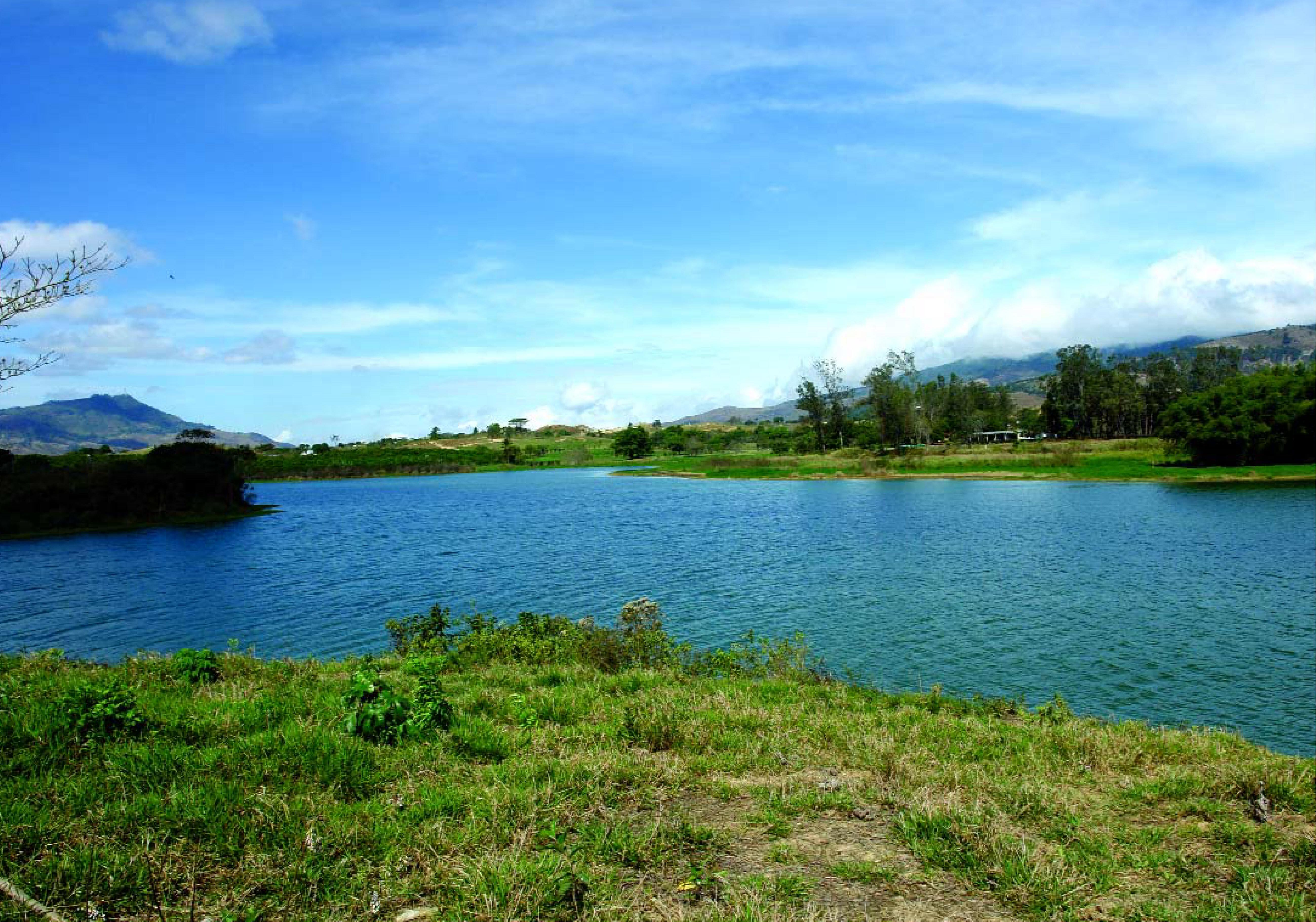 vista de la represa cabuy en la entrada por la via hacia salom